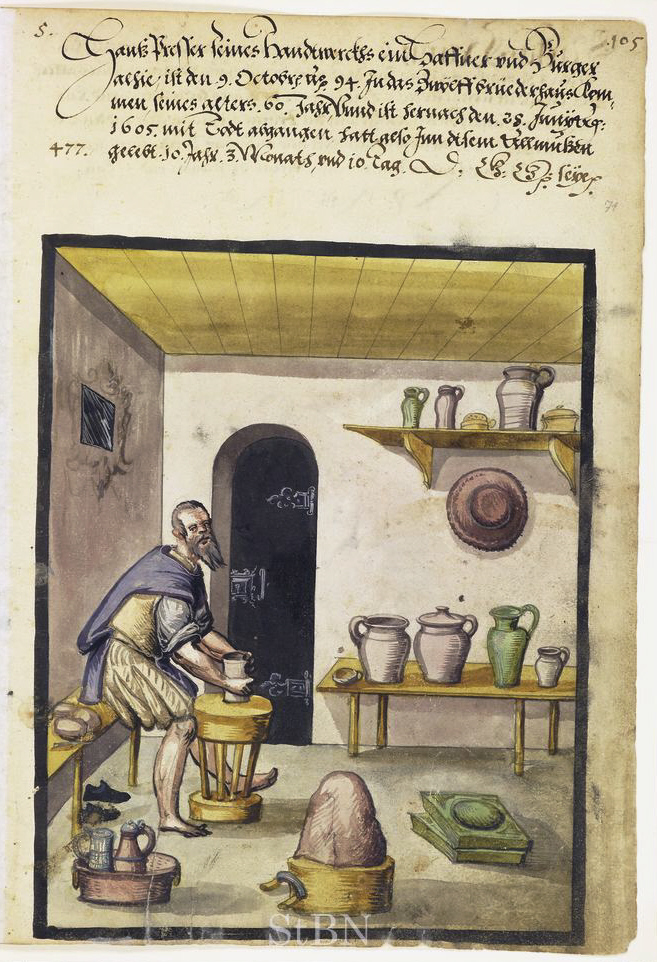 Hanß (Hans) Presser, Haffner (Hafner) Transkription und weitere Informationen